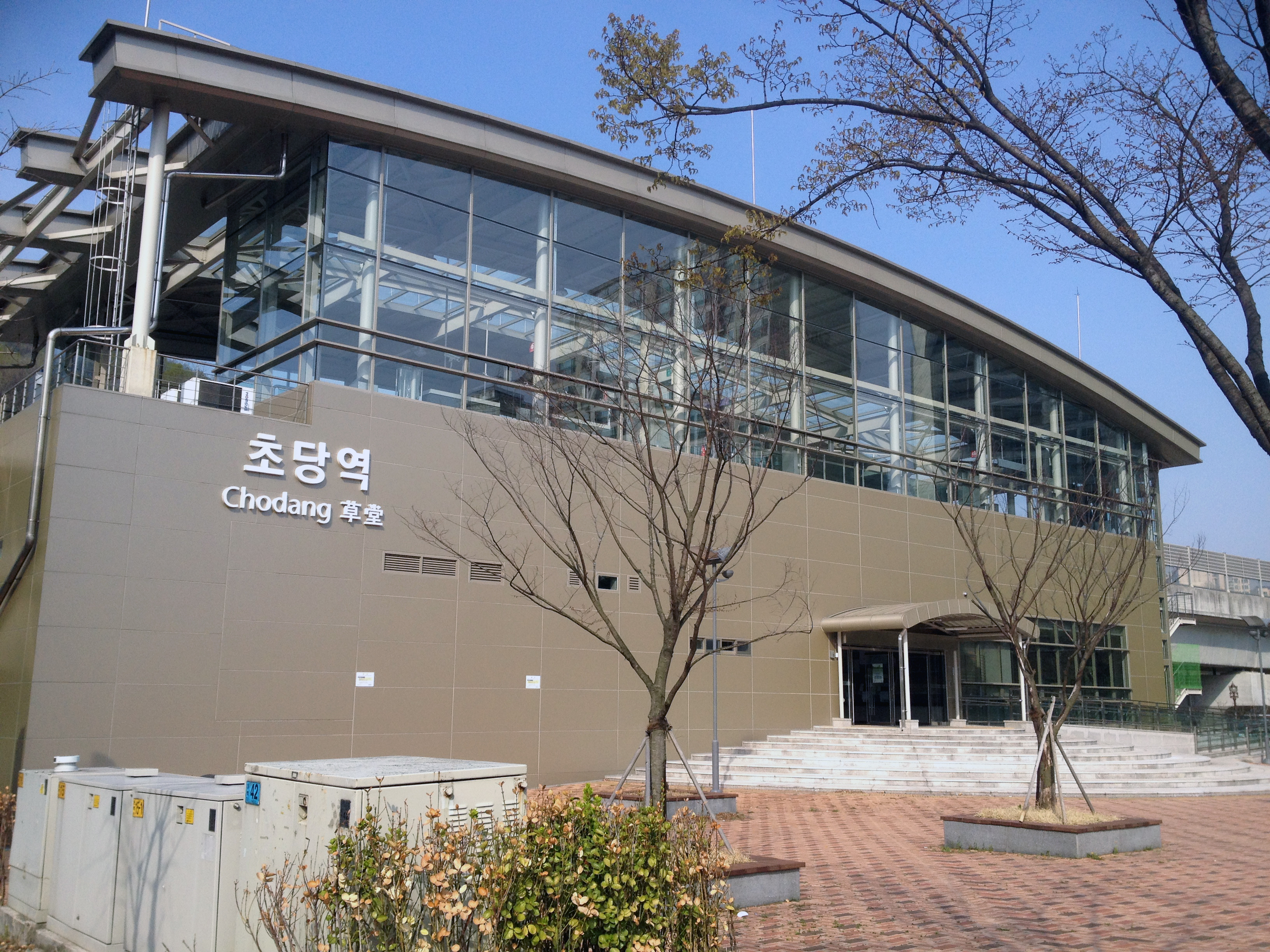 초당역 역사